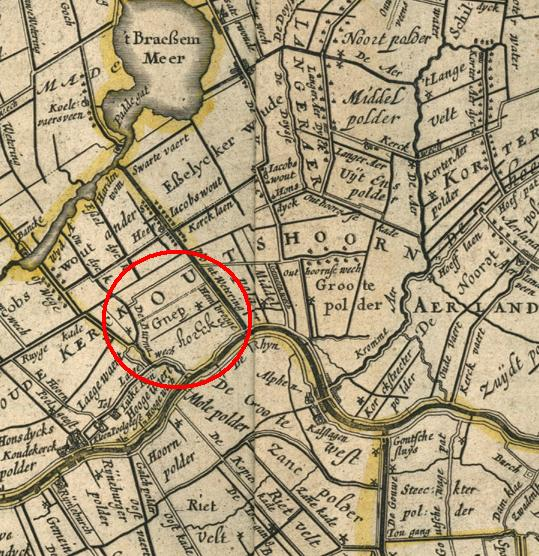 Gnephoek, Rijnland amstelland atlasmaior